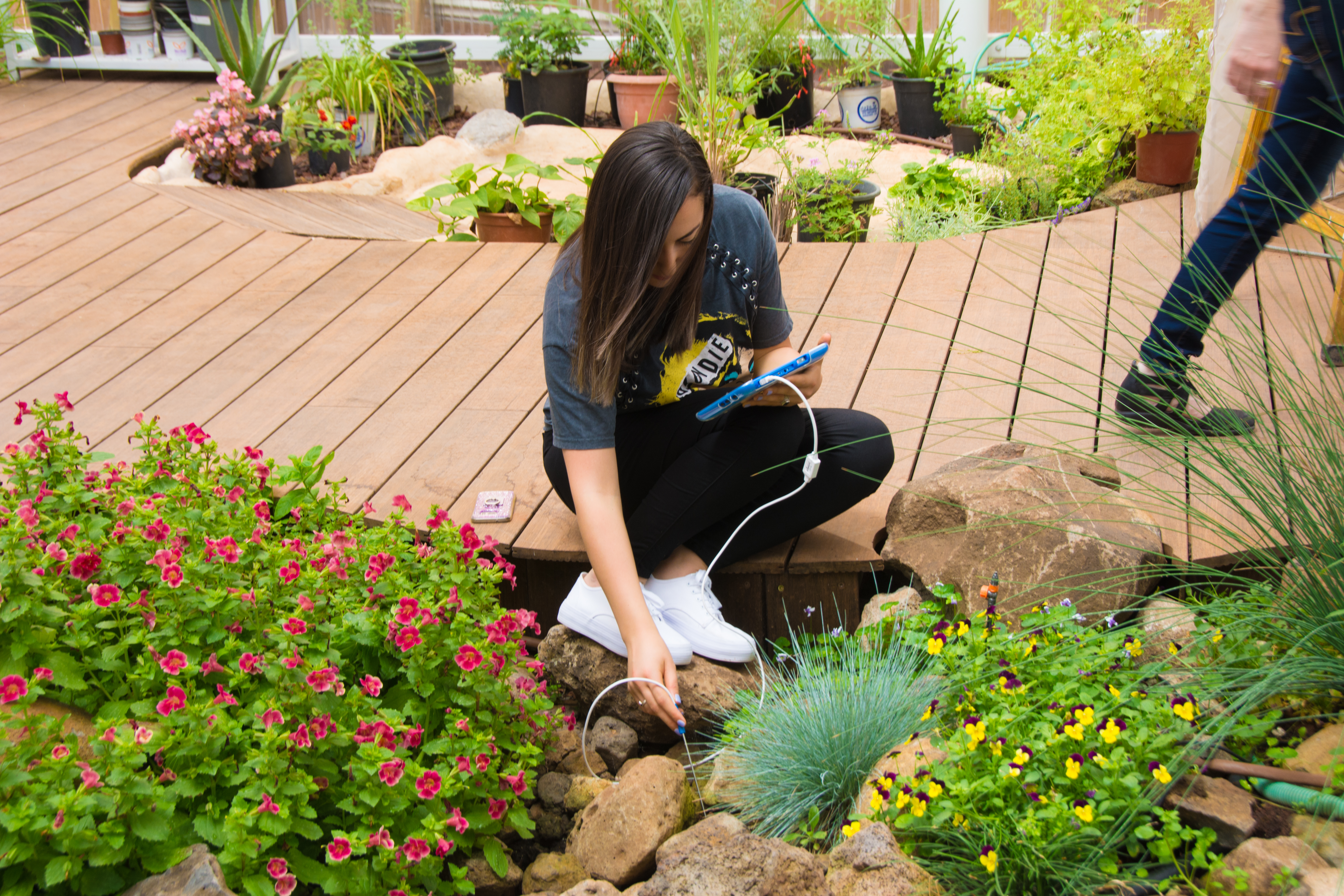 Ohalo Biophilic Learning Space